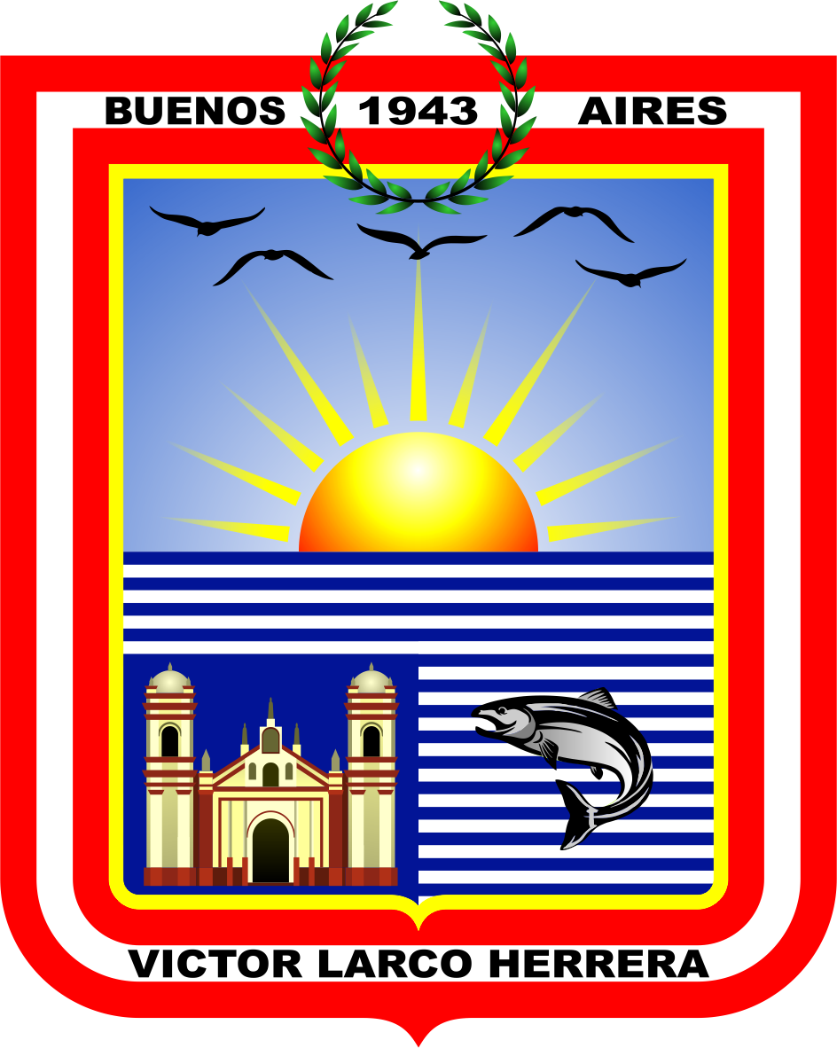 Distrito de Víctor Larco Herrera - Provincia de Trujillo - Región La Libertad